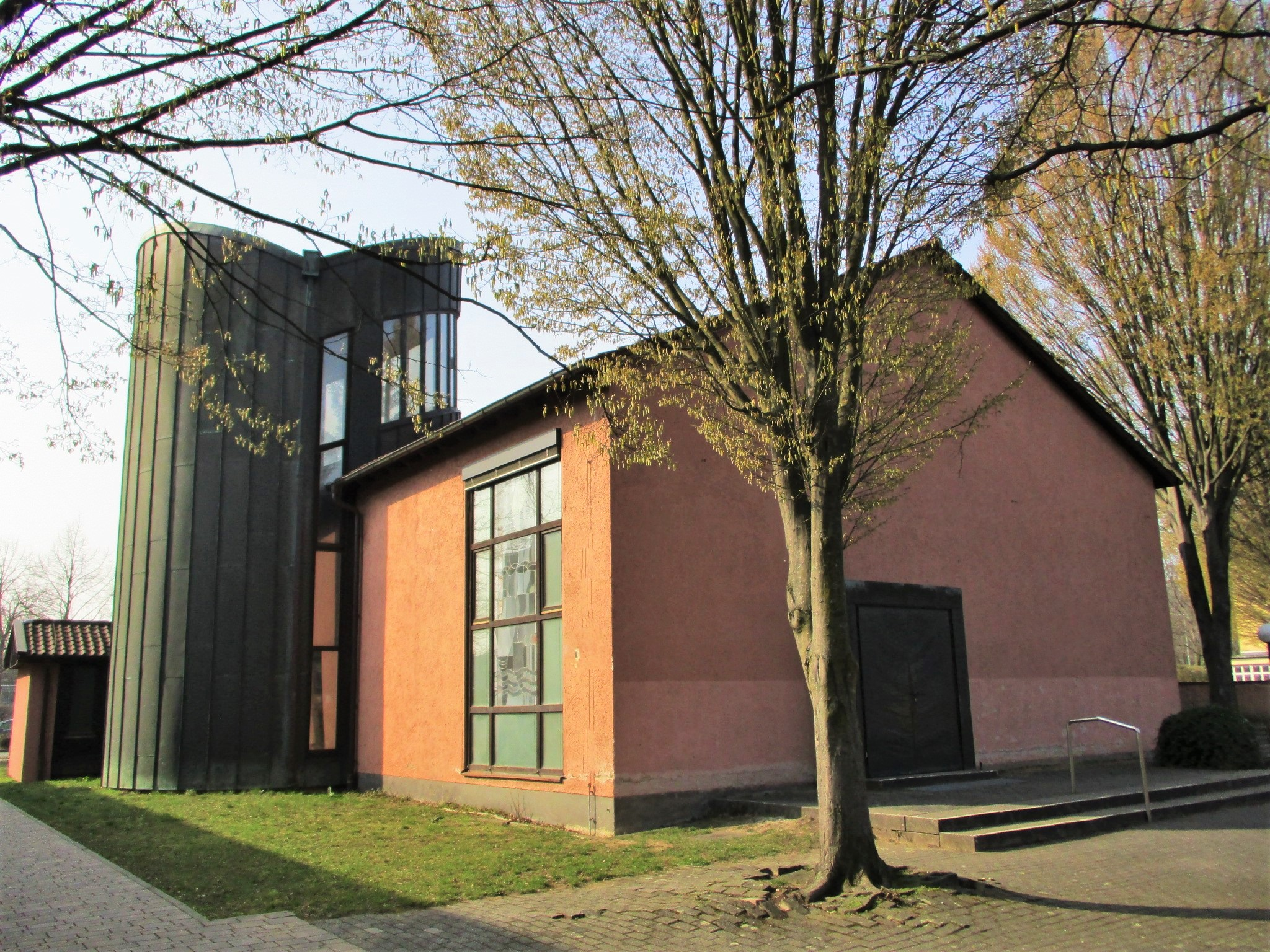 Kath. Kirche Sankt Raphael in Frankfurt am Main, Ludwig-Landmann-Straße 365